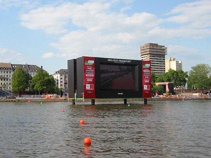 Grossbildleinwand in Frankfurt/Main MainArena (Blick vom Südufer auf größtenteils verdeckten Tribünenabschnitt sowie hr3-Bühne)